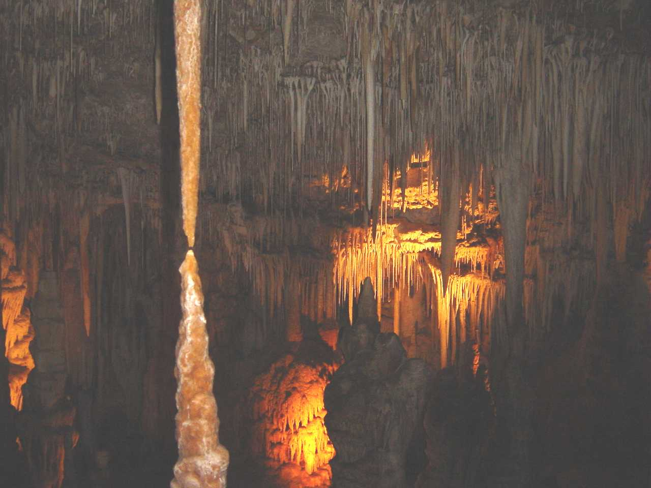 זקיף פוגש נטיף בhe:מערת אבשלום.